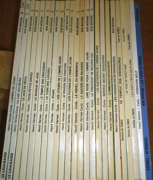 Bob Morane (bandes dessinées).